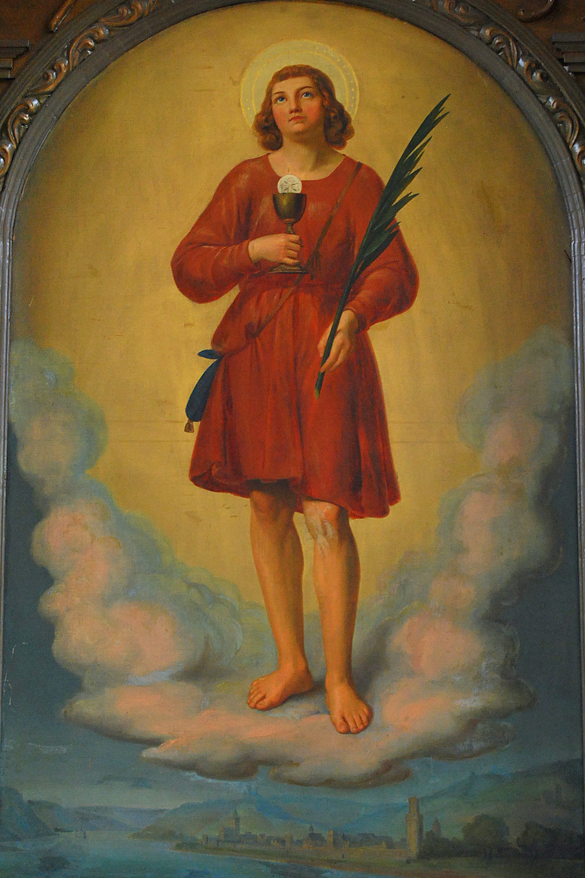 Oberwesel Wernerkapel Altaarschilderij "Der Knabe Werner", 1845, Öl auf Holz, 2 x 1 m. ehemals Wernerkapelle Oberwesel. Literatur:Christine Klaus: Peter Joseph Molitor (1821-1898) - ein Koblenzer Maler, in: Stadtarchiv Koblenz (Hrsg.): Koblenzer Beiträge zur Geschichte und Kultur. Neue Folge 15/16, 2005/2006, S. 171-196